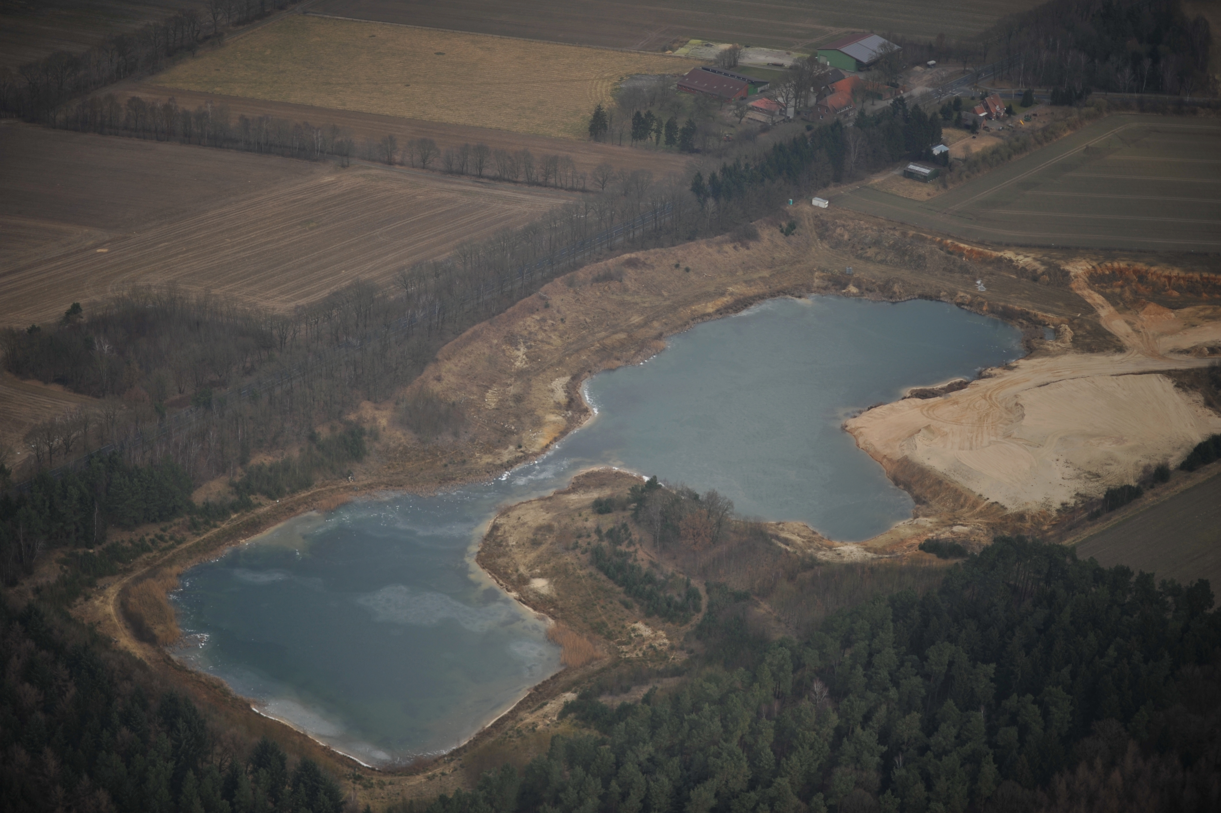 Fotoflugkurs Cuxhaven 2013: See bei Schwingerbaum